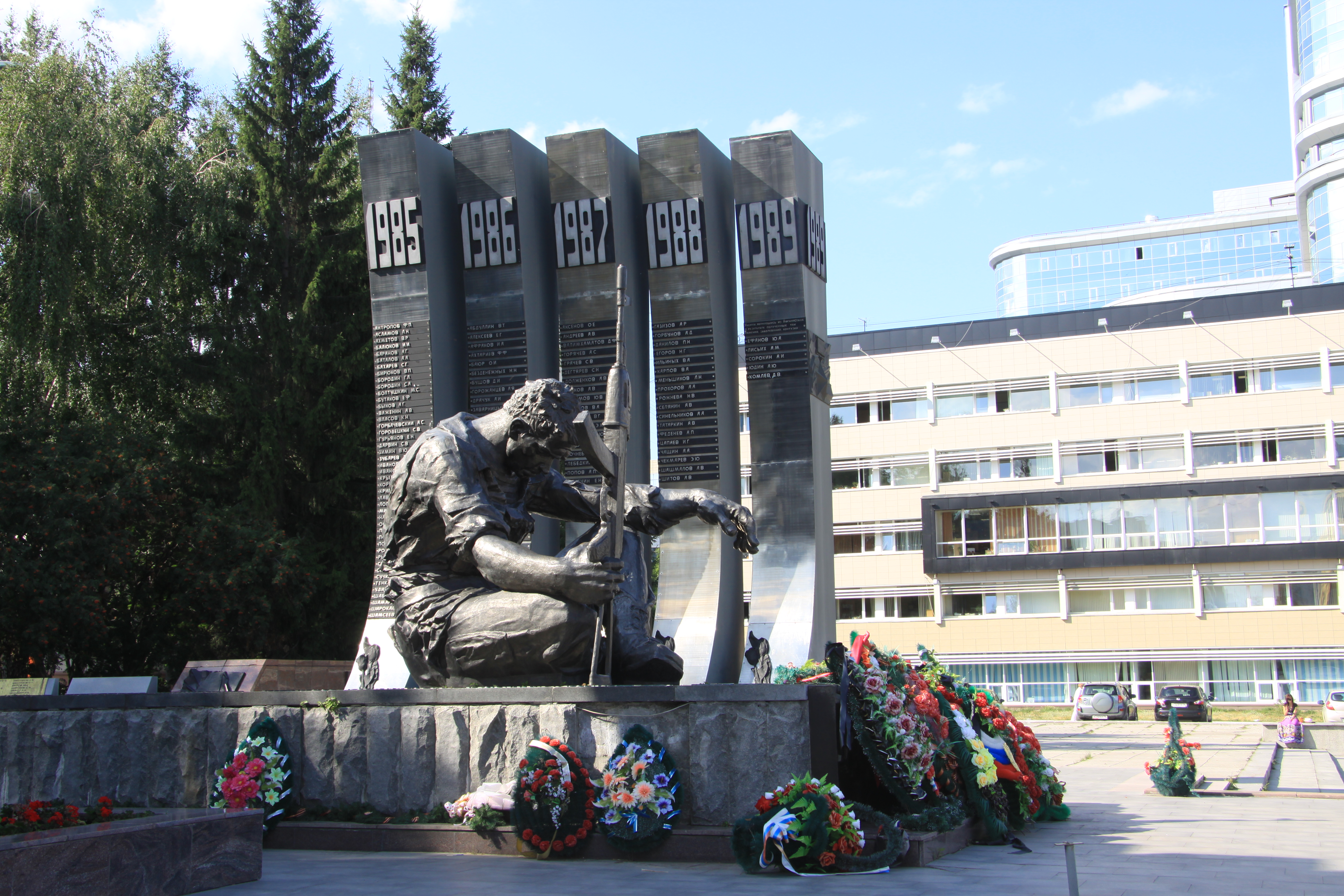 Чёрный тюльпан